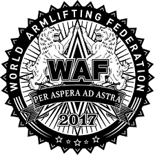 World Armlifting Federation (WAF)